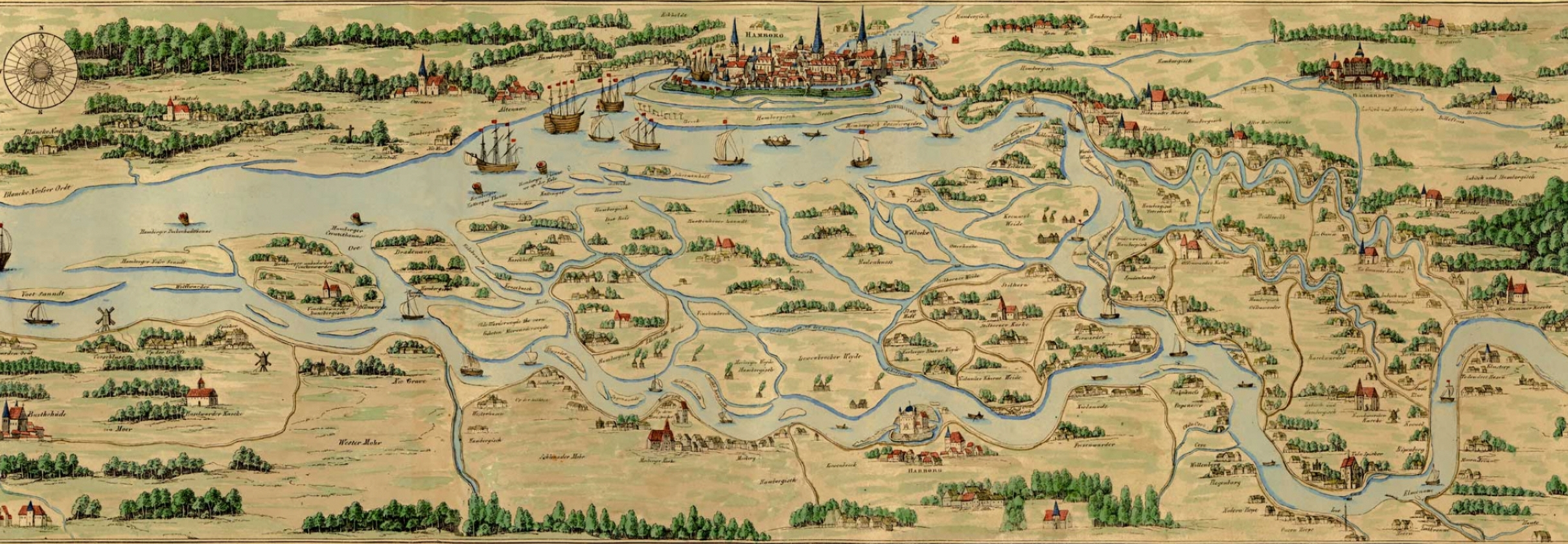 Hamburger Elbgebiet, Ausschnitt aus der Elbkarte nach Melchior Lorichs aus dem Jahr 1568.